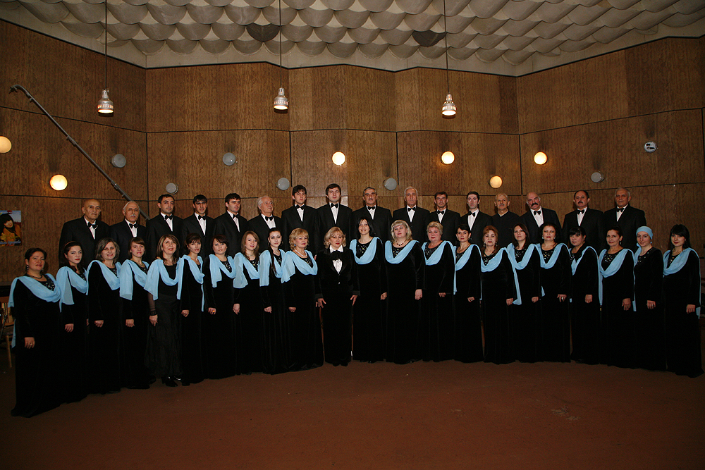 Госхор Республики Дагестан